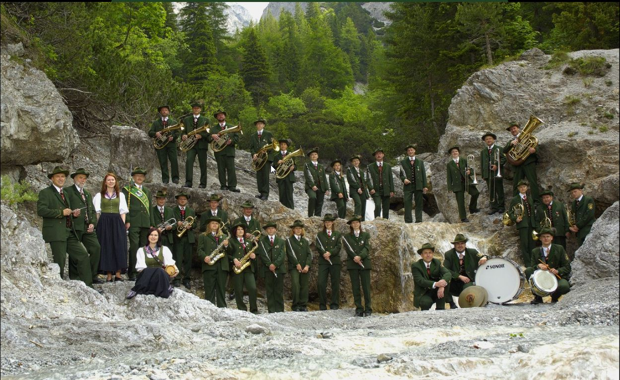 Musikerinnen und Musiker des MVE 2005